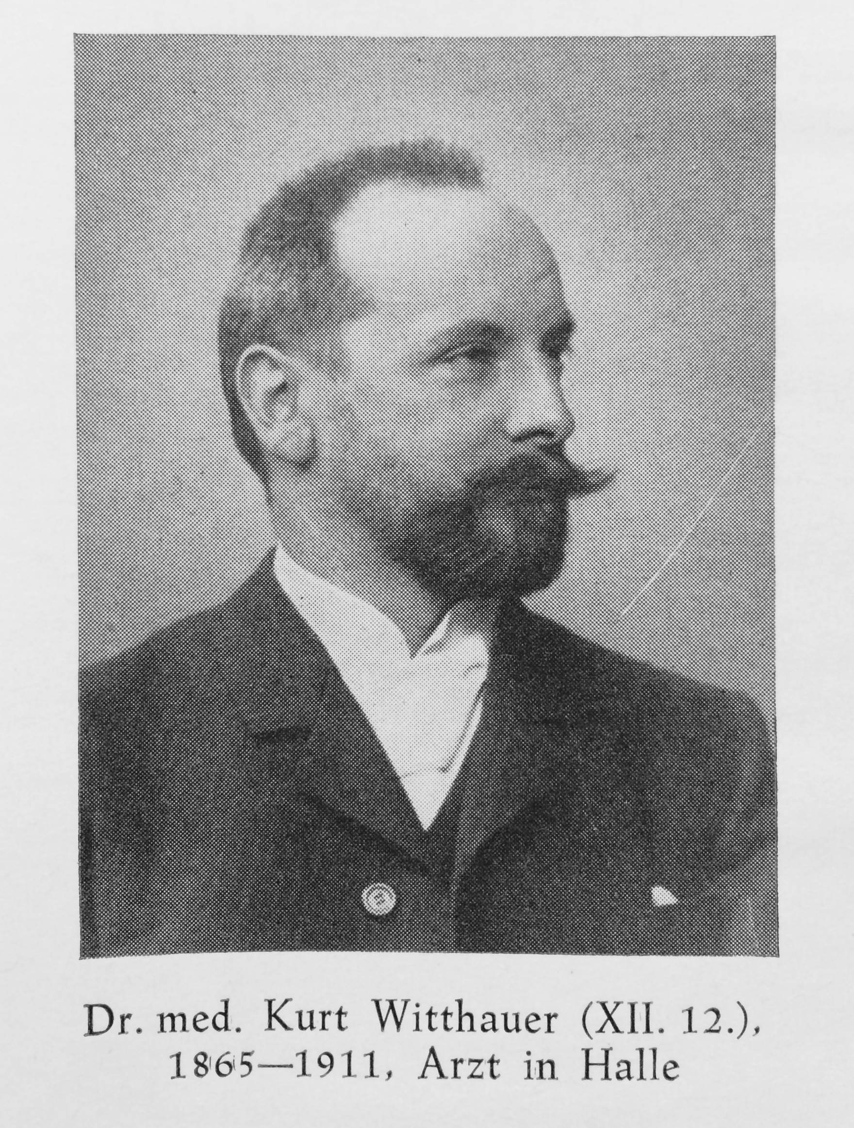 Bild Porträt von Dr. Kurt Witthauer